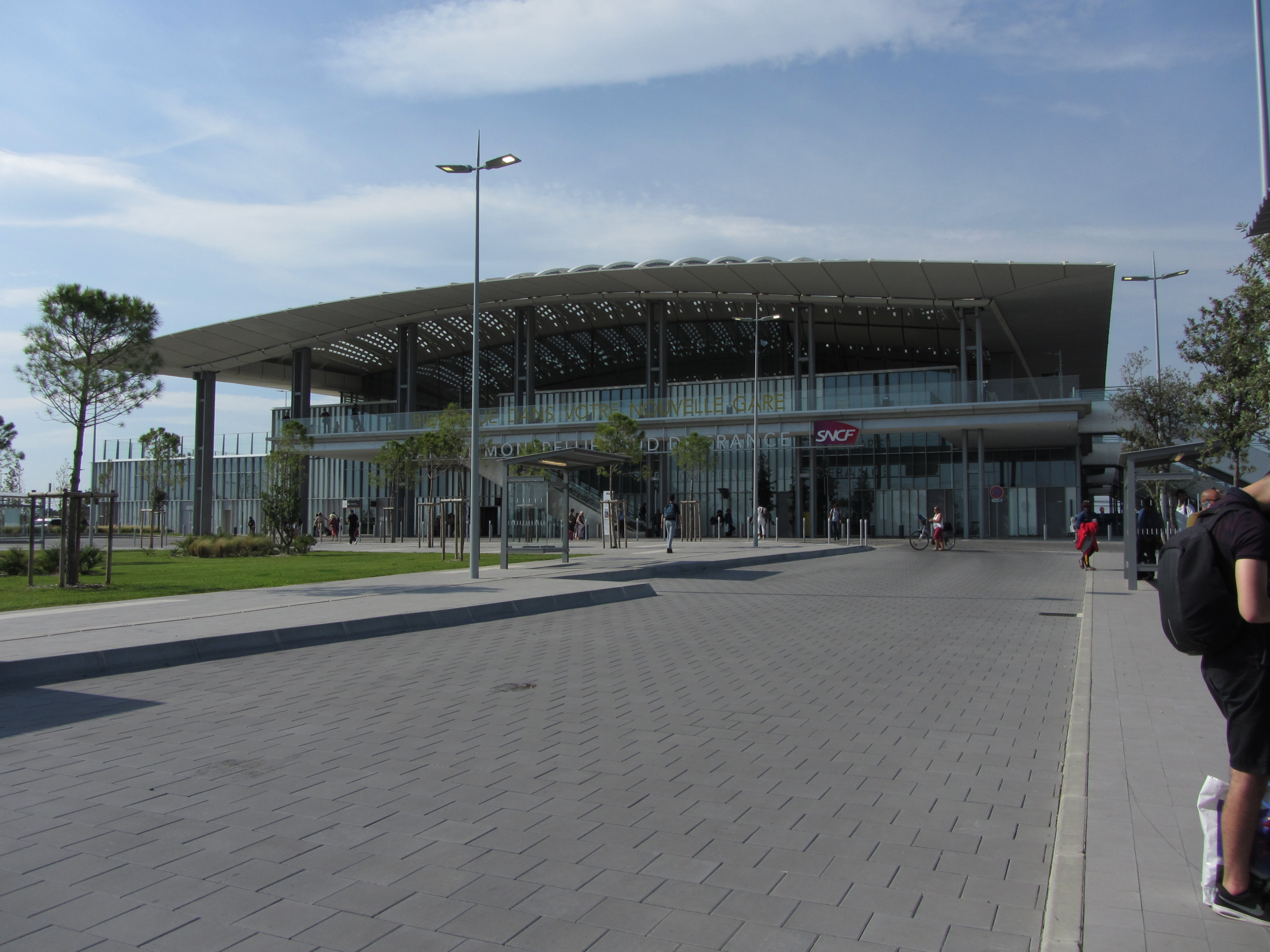 La façade de la gare de Montpellier-Sud-de-France.